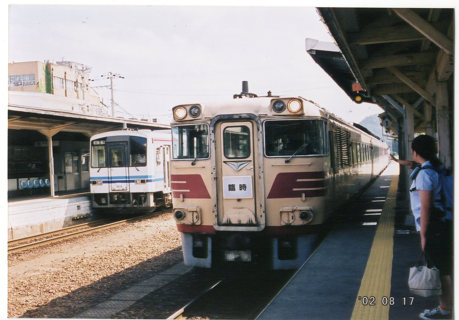 江津駅にて投稿者自身が撮影 結果的なキハ181系おき号のラストラン